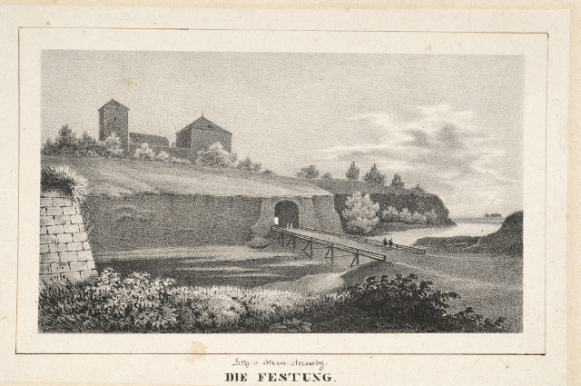 MuuseumikoguGraafika AutorStern, Friedrich SiegmundOlemusgraafikaOriginaaloriginaalKunstieseSäilivusrahuldav